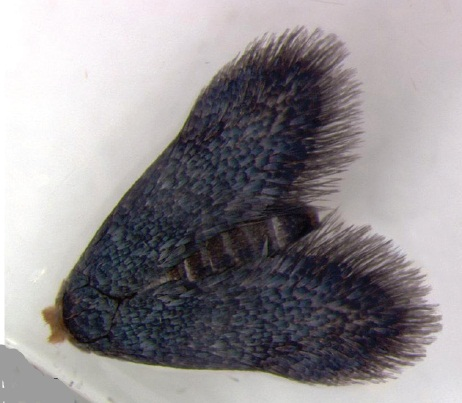 Pectinivalva quintiniae